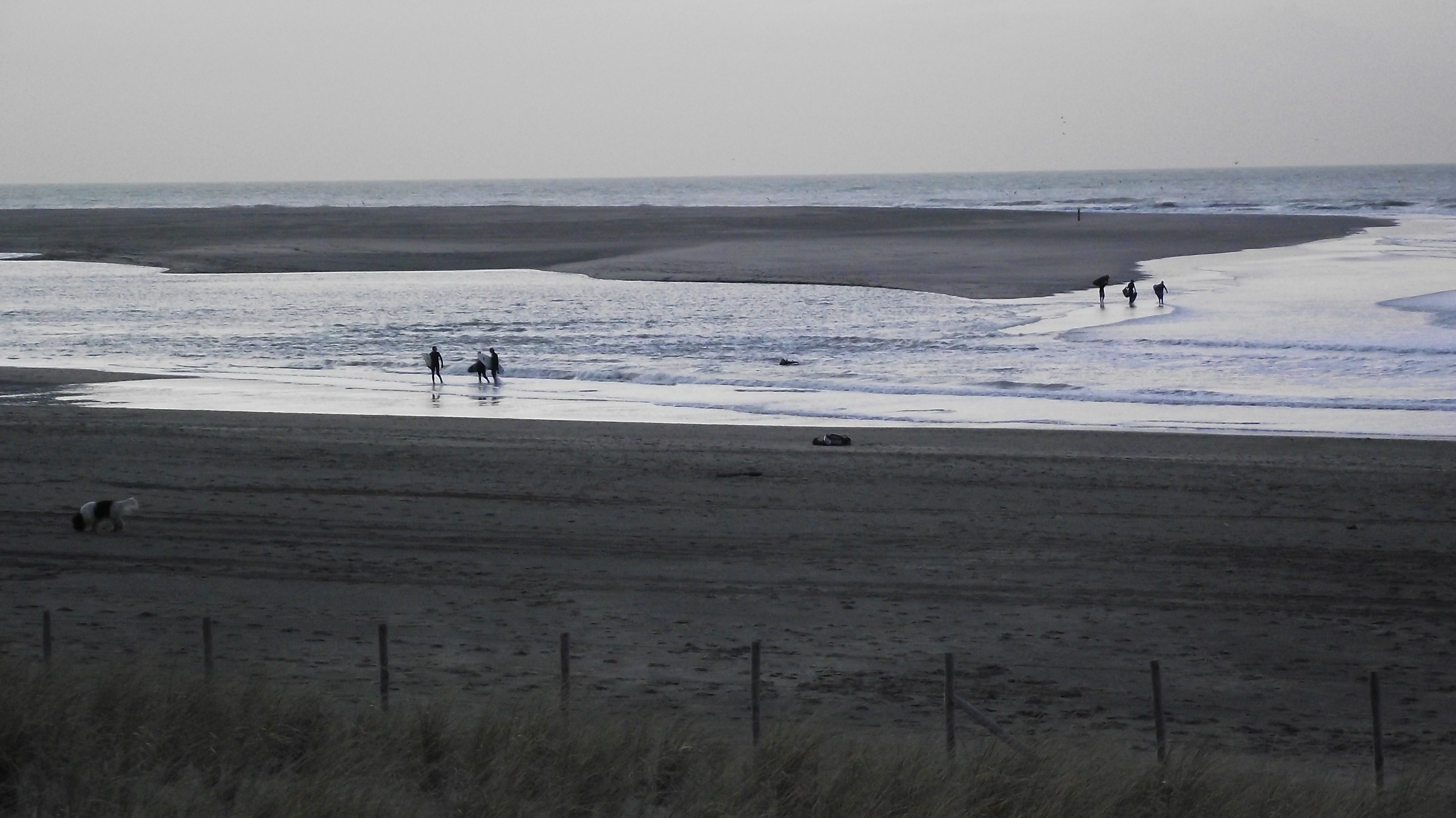 De nauwe doorgang van de baai die bij laag tij doorwaadbaar is. Door de getijstromen zal deze doorgang nooit helemaal dichtslippen.